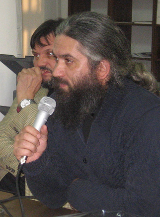 Ștefan Baștovoi (Ieromonahul Savatie)